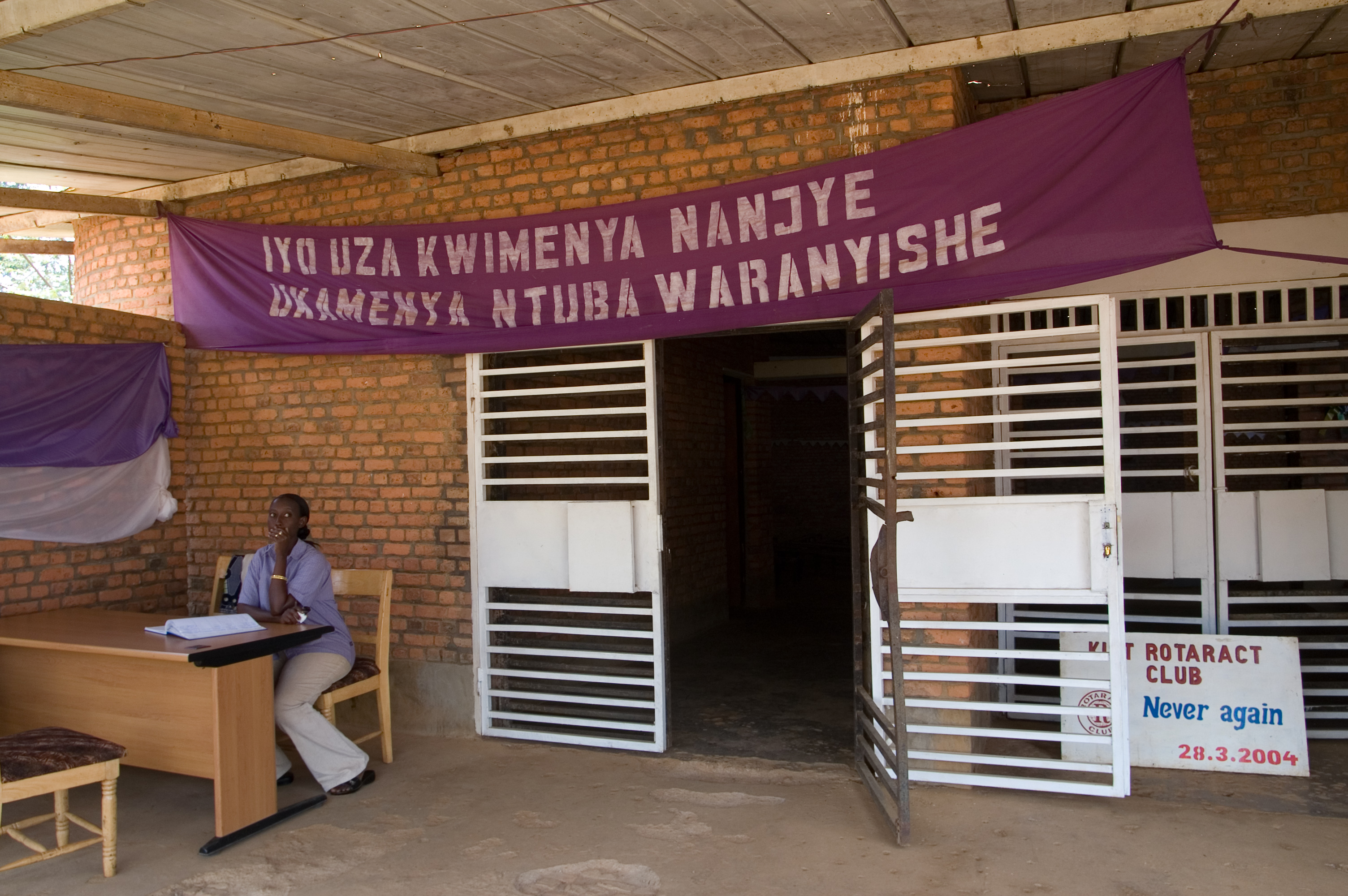 Nyamata Memorial Site. Iyo uza kwimenya nanjye ukamenya ntuba waranyishe. (Translation: If you were conscious of your humanity, you would not have stolen mine.)